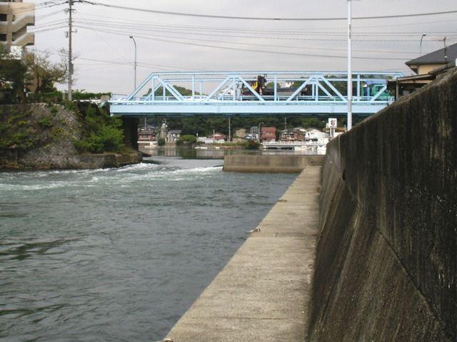 早岐瀬戸・観潮橋（国道202号）。海水は水音を立てながら大村湾側へ流入している（当日の満潮時刻 : 佐世保10:26・大村13:21）。